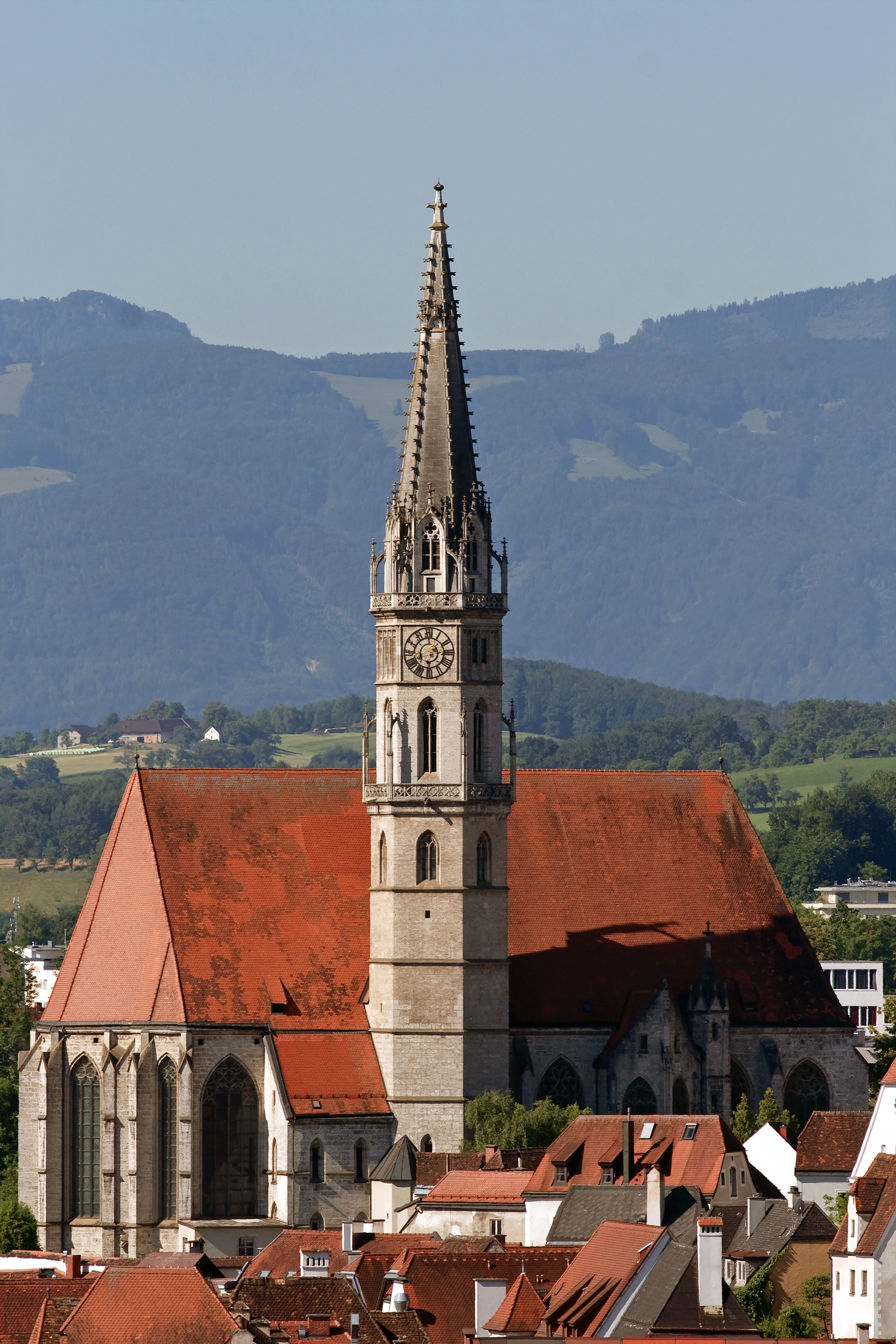 Die Steyrer Stadtpfarrkirche vom Tabor aus gesehen